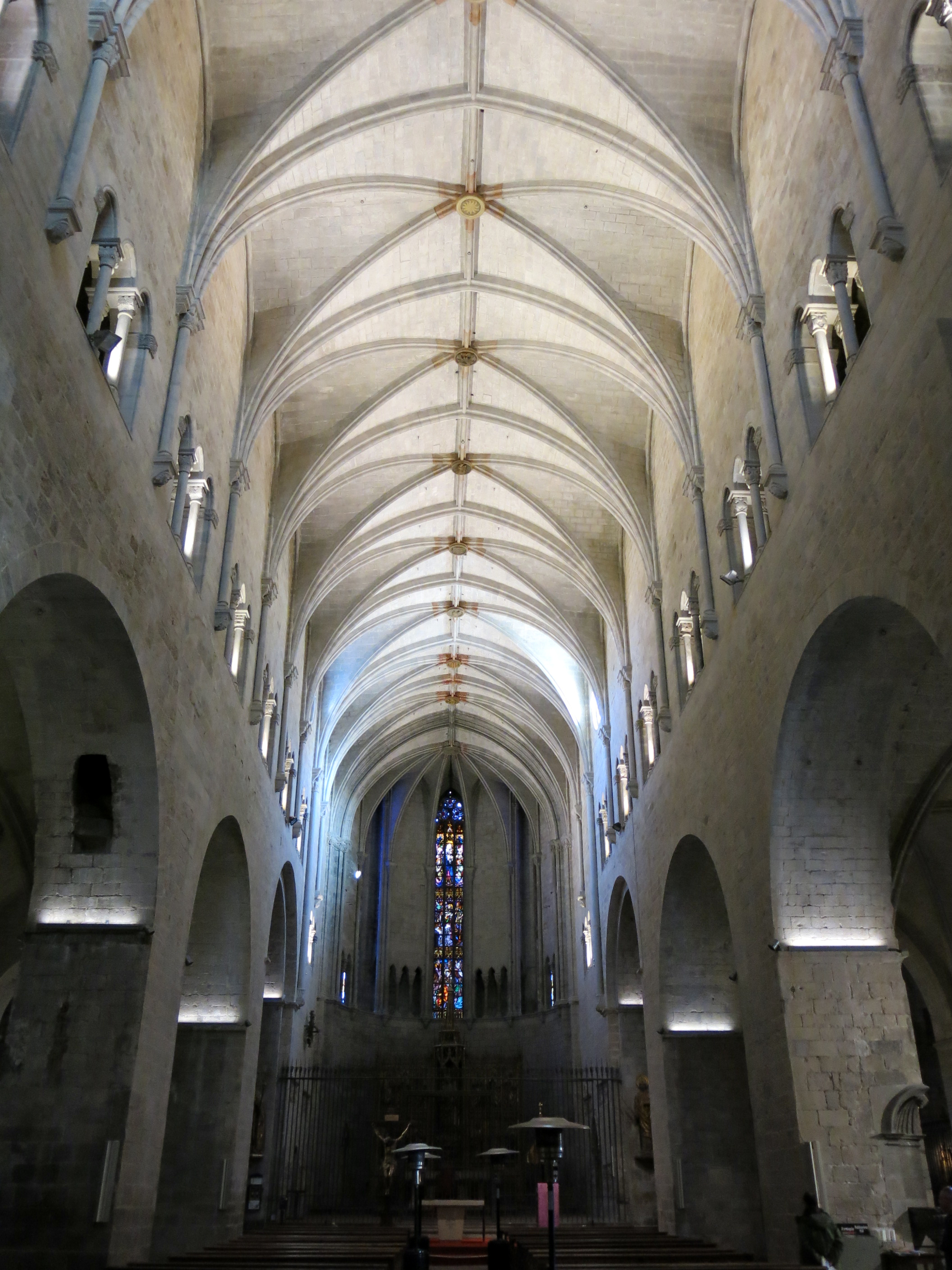 Església de Sant Feliu (Girona)